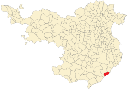 Situación de San Felíu de Guixols en la provincia de Gerona.